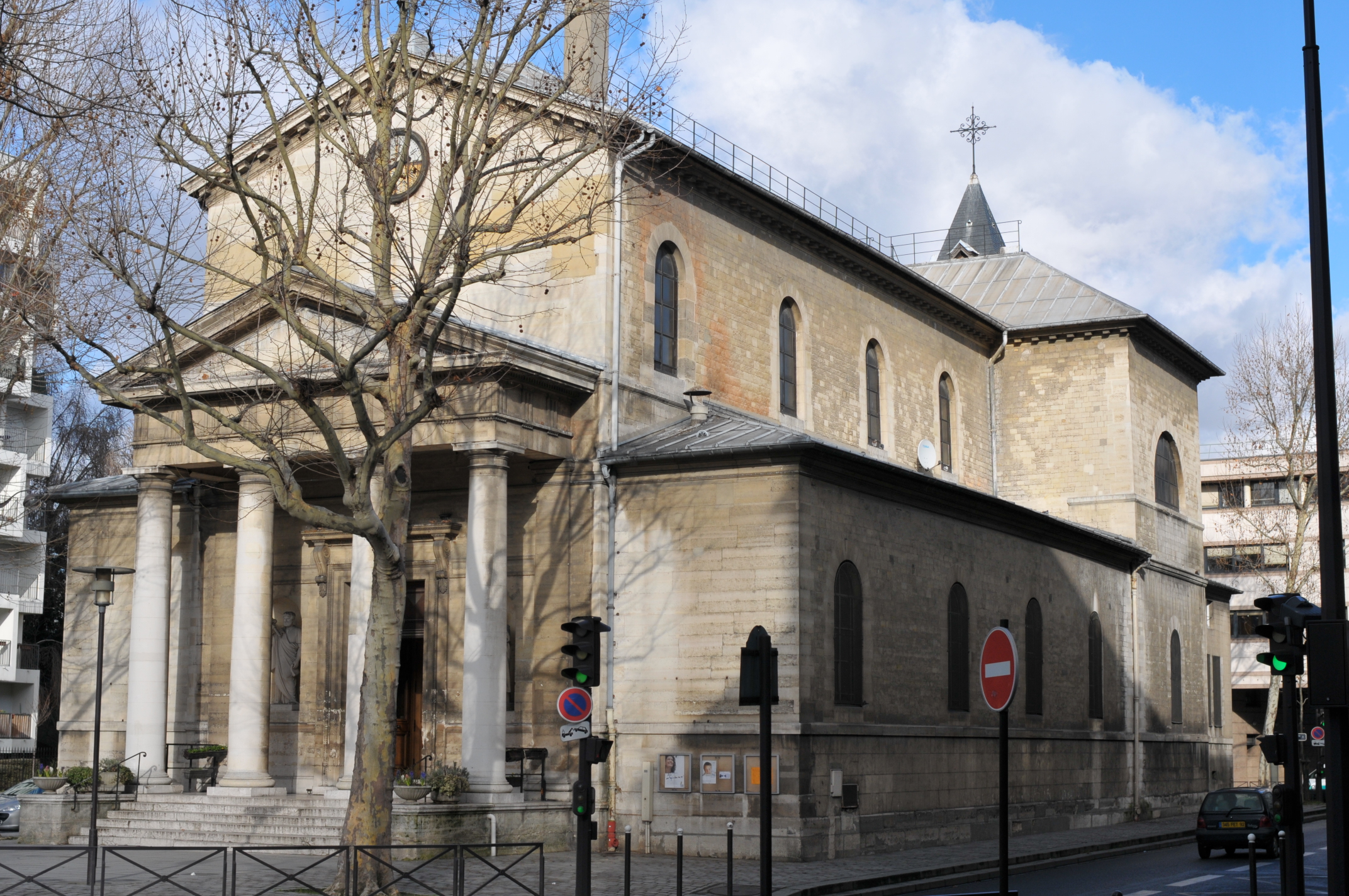 Église Notre-Dame-de-la-Nativité de Bercy, Paris, France